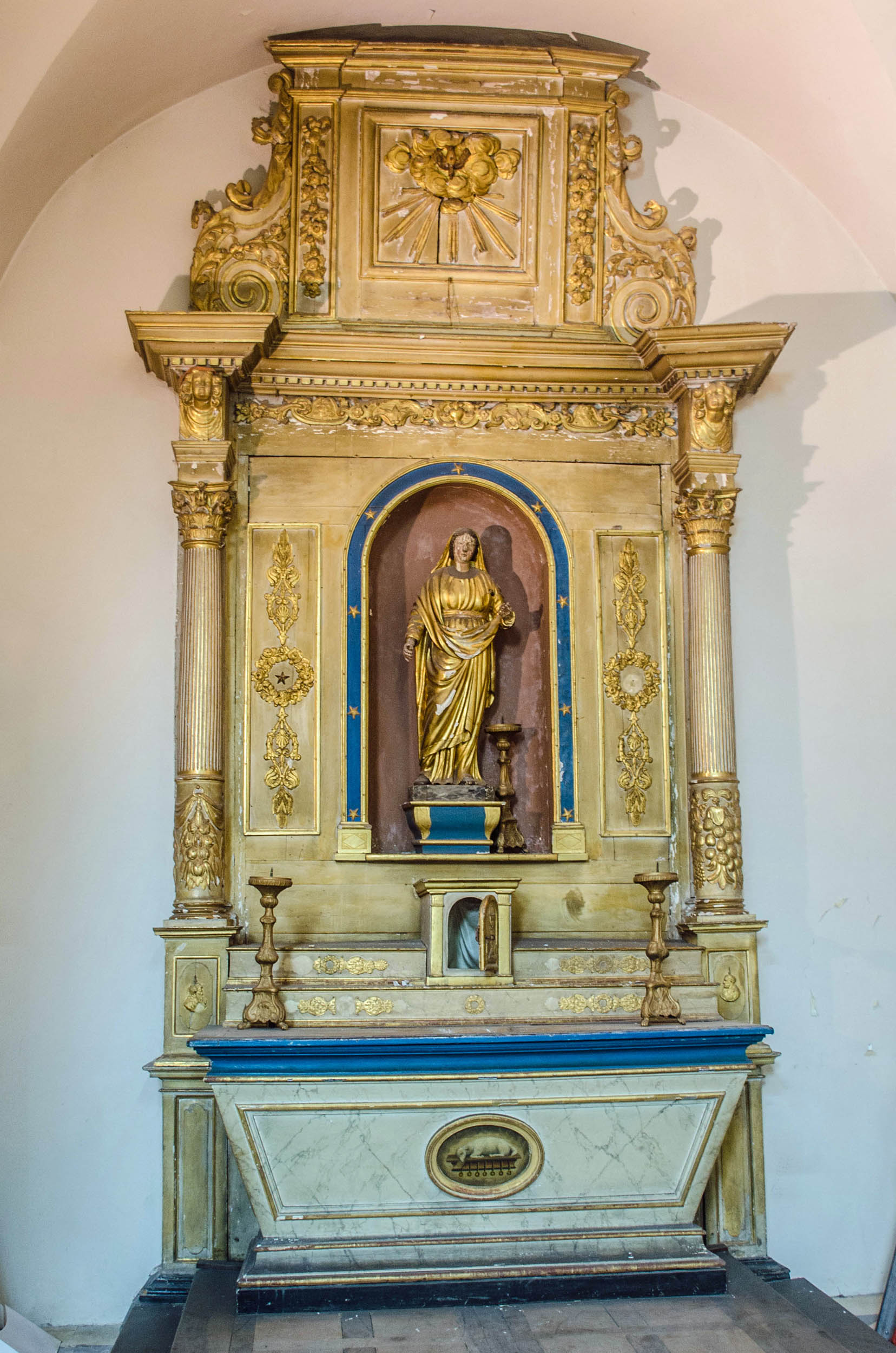 Valence (Drôme), chapelle des Capucins, retable de la Vierge (XVIIe s.)